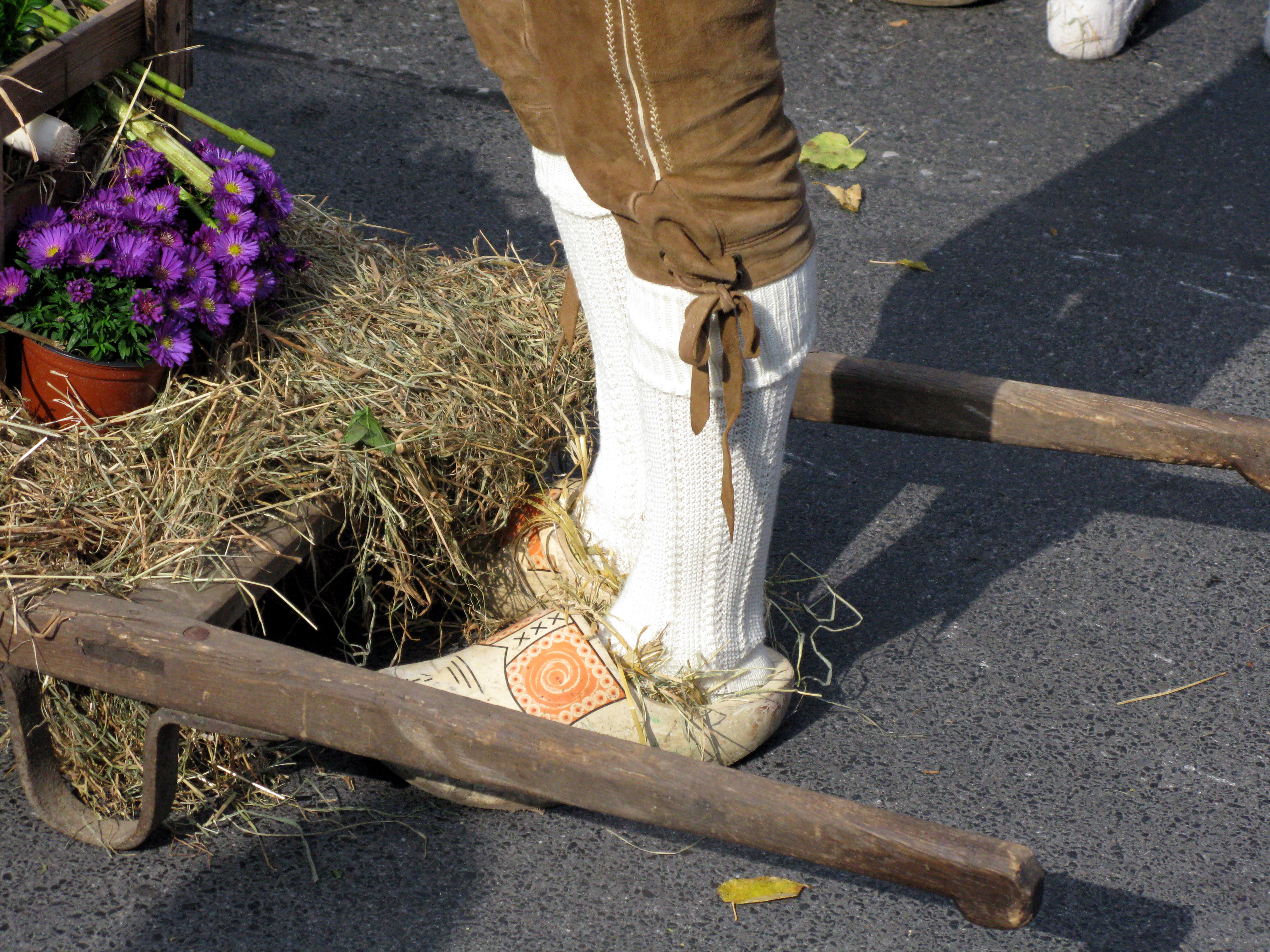 Erntedankfest in Düsseldorf-Urdenbach